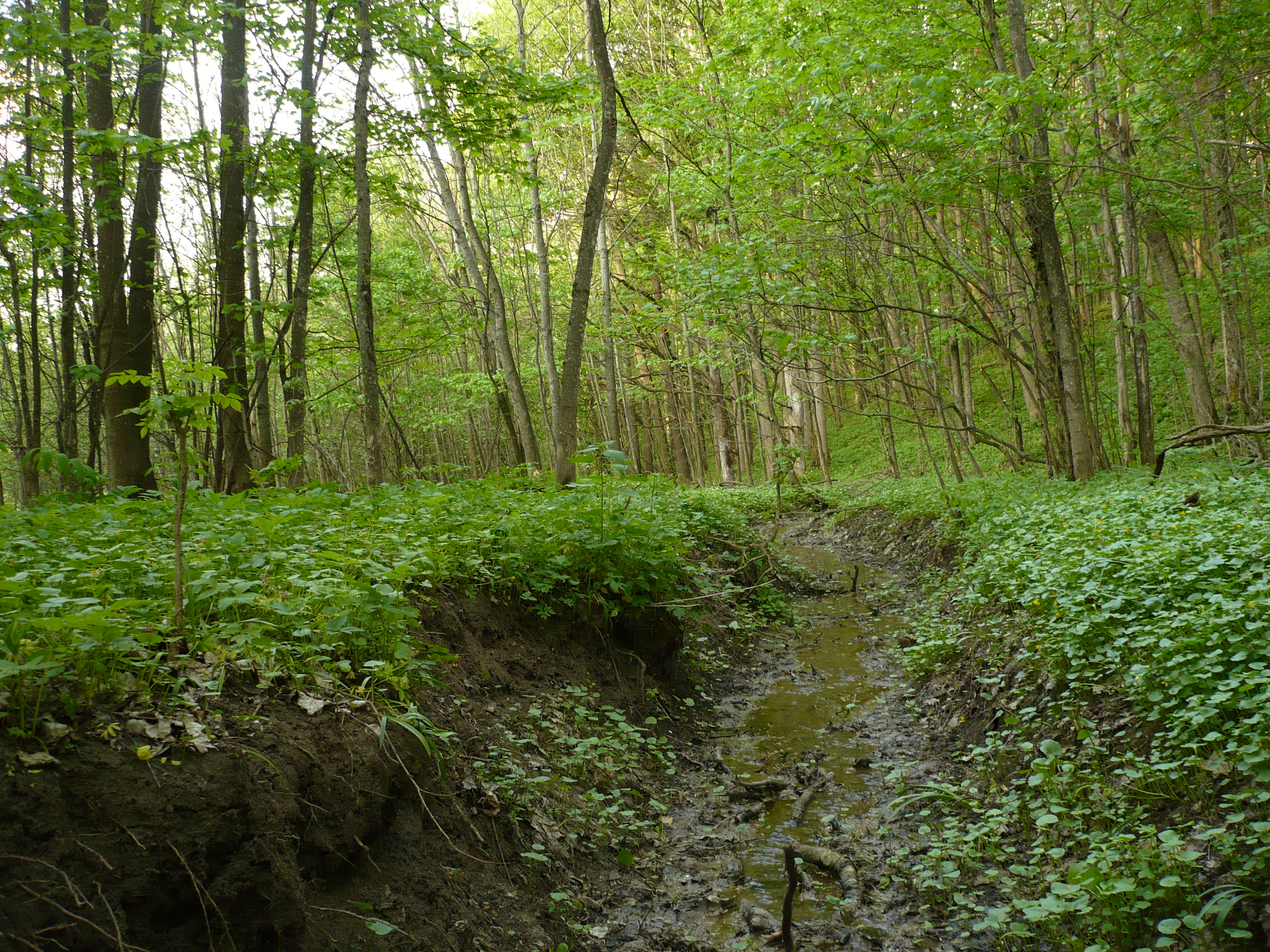 Ручей Паюшки. Лесное урочище Каменное, прилегающее к балке Каменный лог